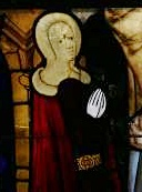 Anna von der Pfalz, Herzogin von Berg, auf dem Westfenster des Altenberger Domes, als Stifterin